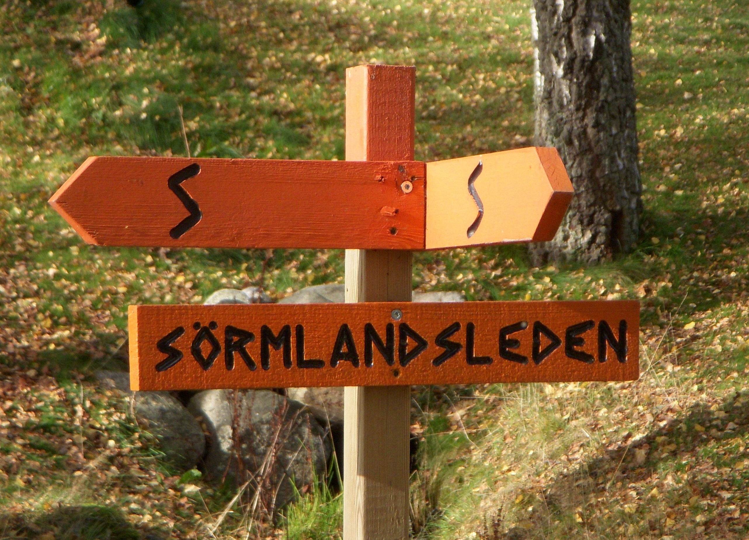 Vägvisare på Sörmlandsleden vid Lida friluftsgård